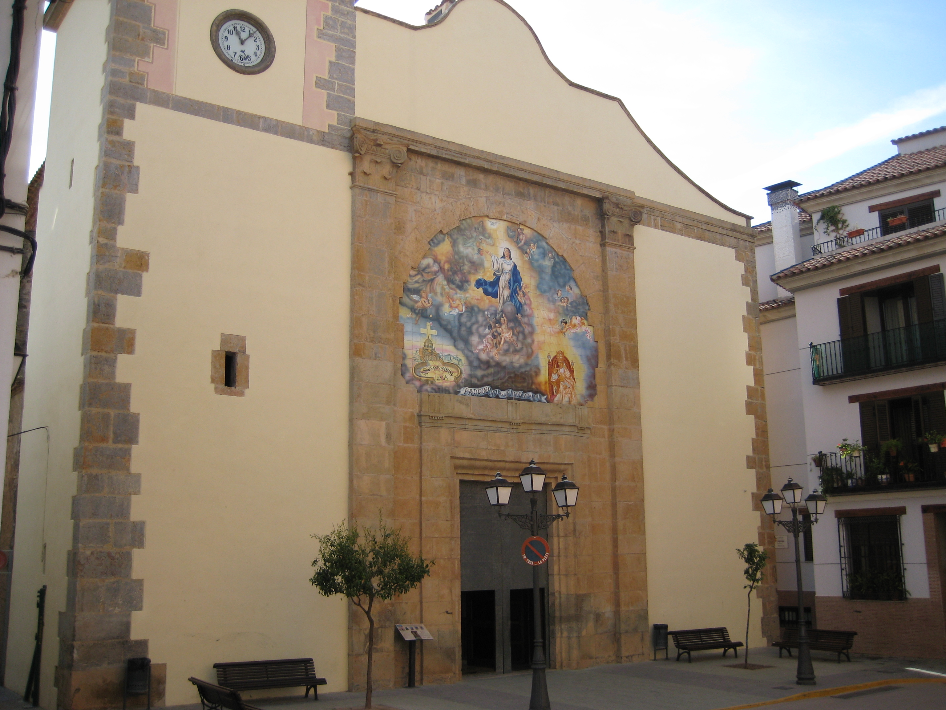 Façana de l'església de l'Assumpció de Suera (Plana Baixa)